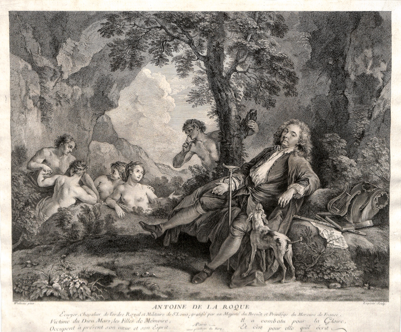 Portrait d'Antoine de La Roque propriétaire du Mercure de France gravé par Lepicié d'après Watteau (Basse Définition)